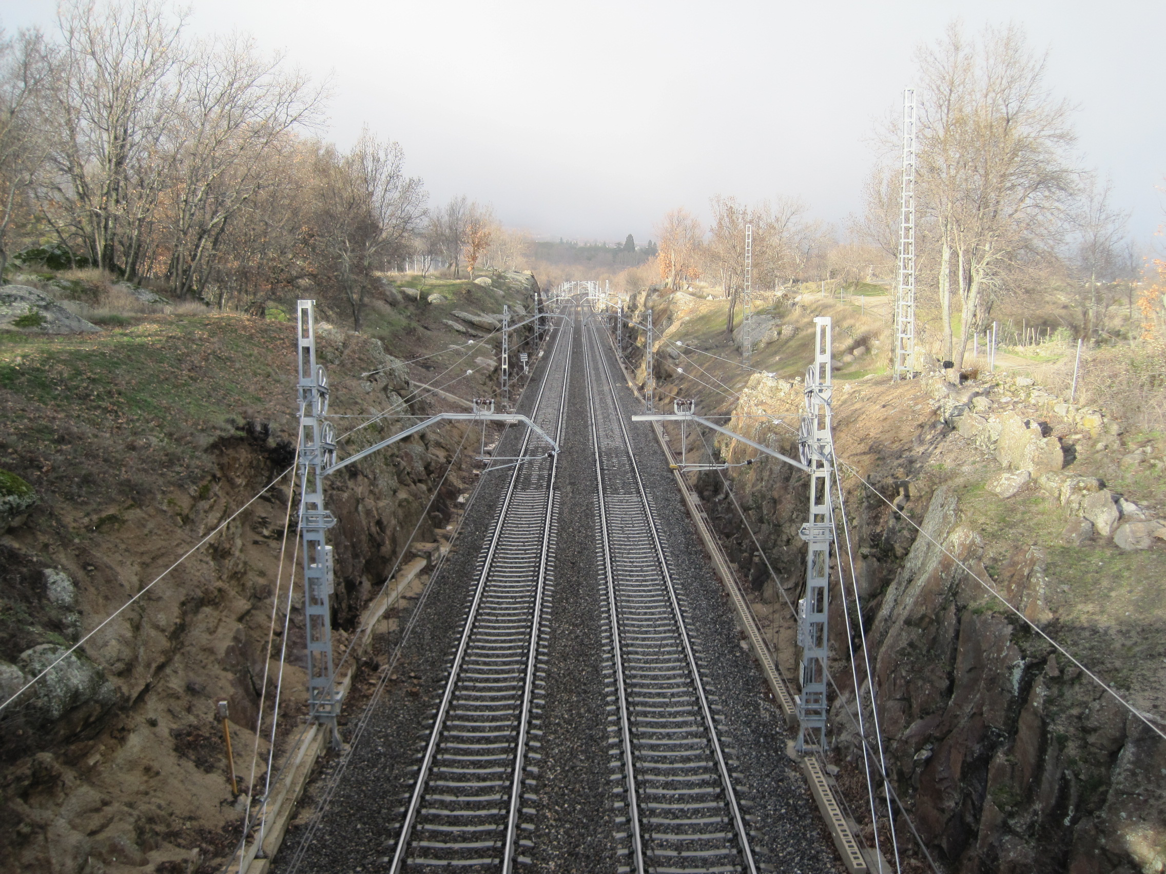 Línea férrea Madrid-Hendaya a su paso por El Escorial (Madrid, España).